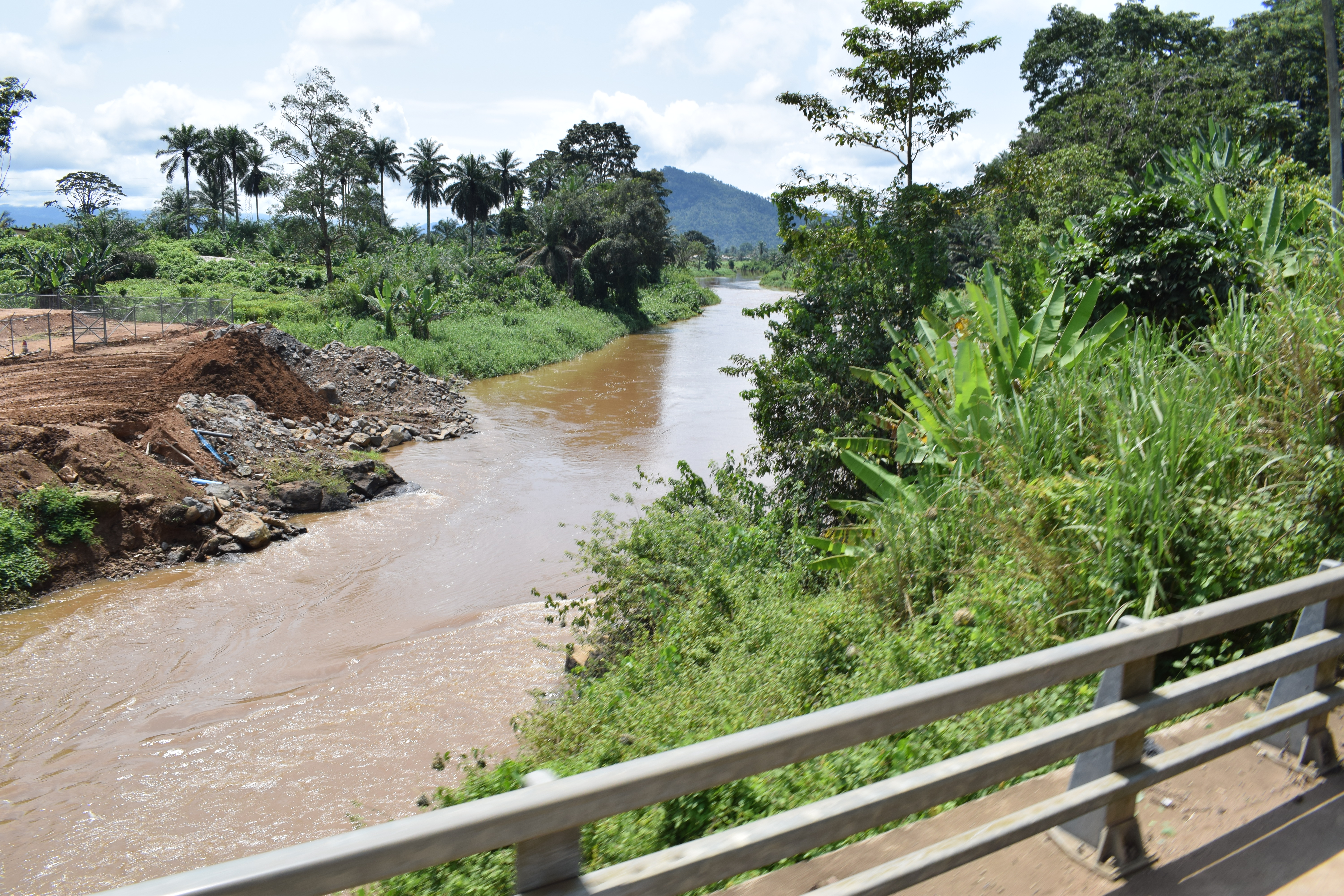 Pont sur le fleuve Nkam à Bafang dans la région de l'Ouest du Cameroun